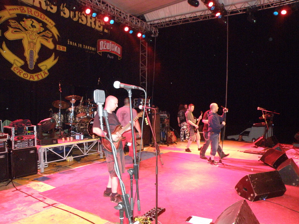 Sastav Hladno pivo. Nastup na 7. Mega Bikers susretima u Slavonskom Brodu.